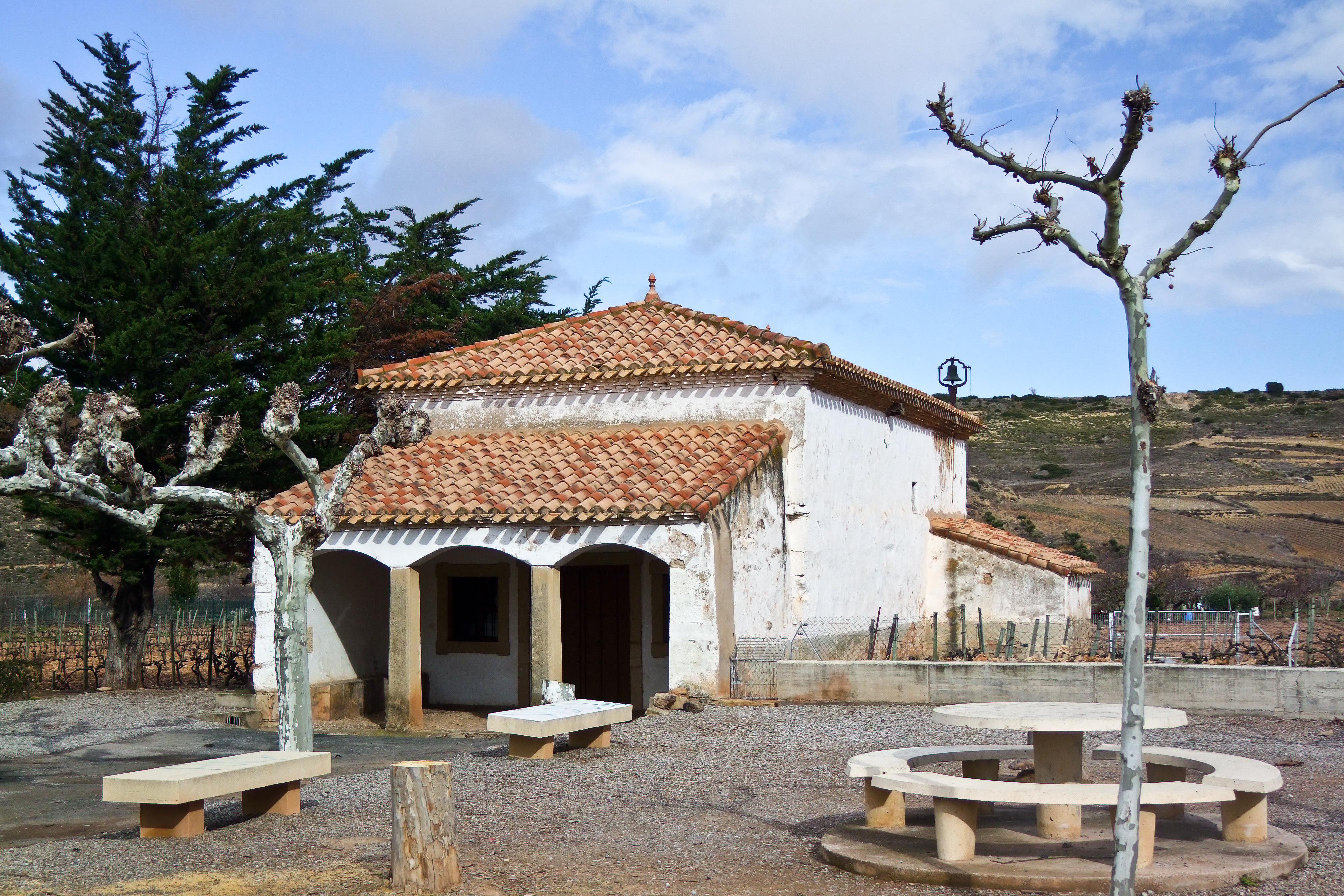 Ermita del Carmen en la localidad de Fuenmayor, La Rioja - España